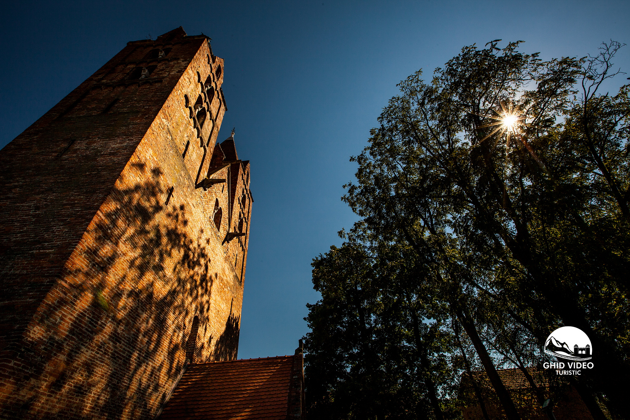 Acas